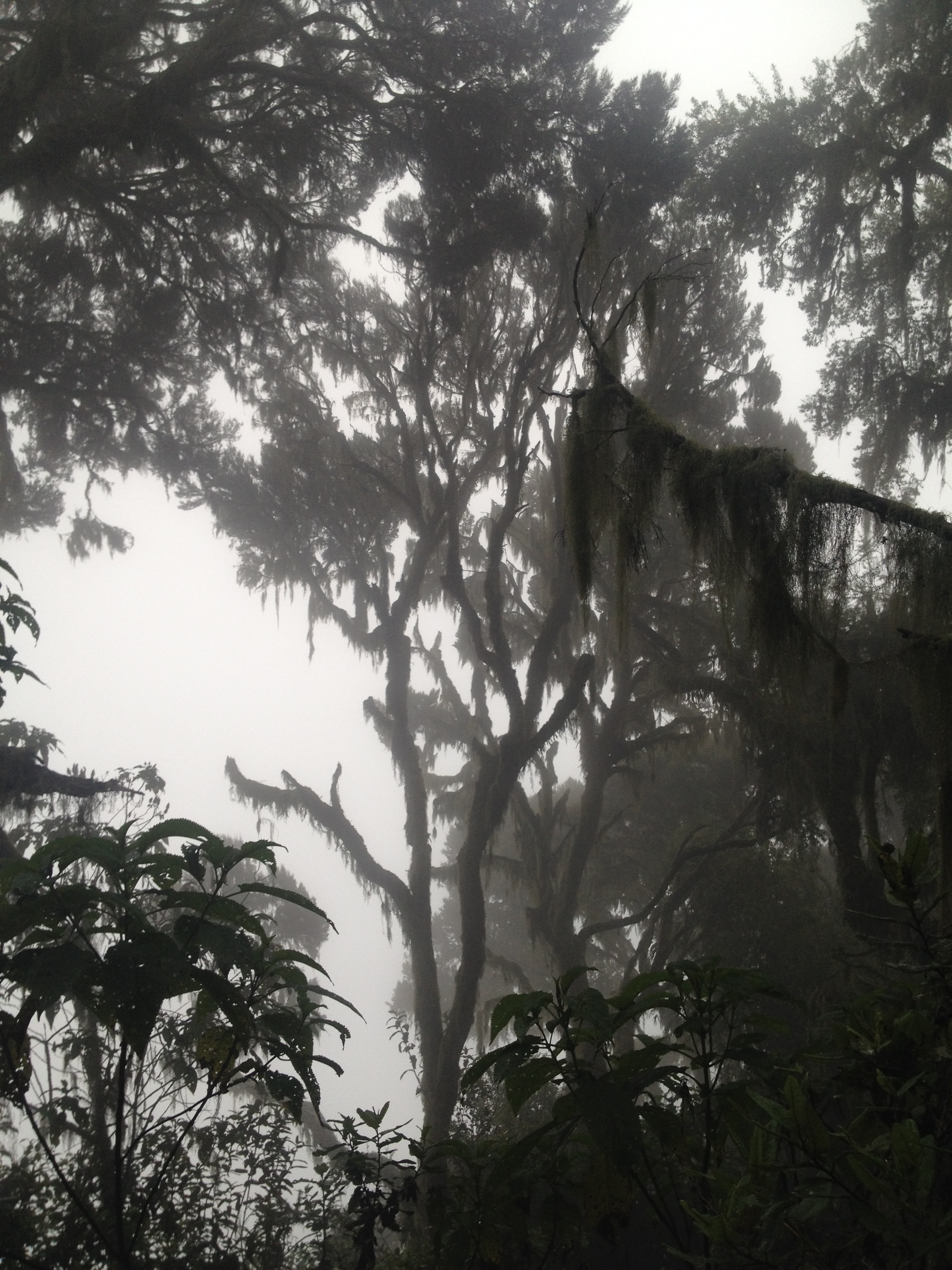 Forêt du Mont Sabynyio